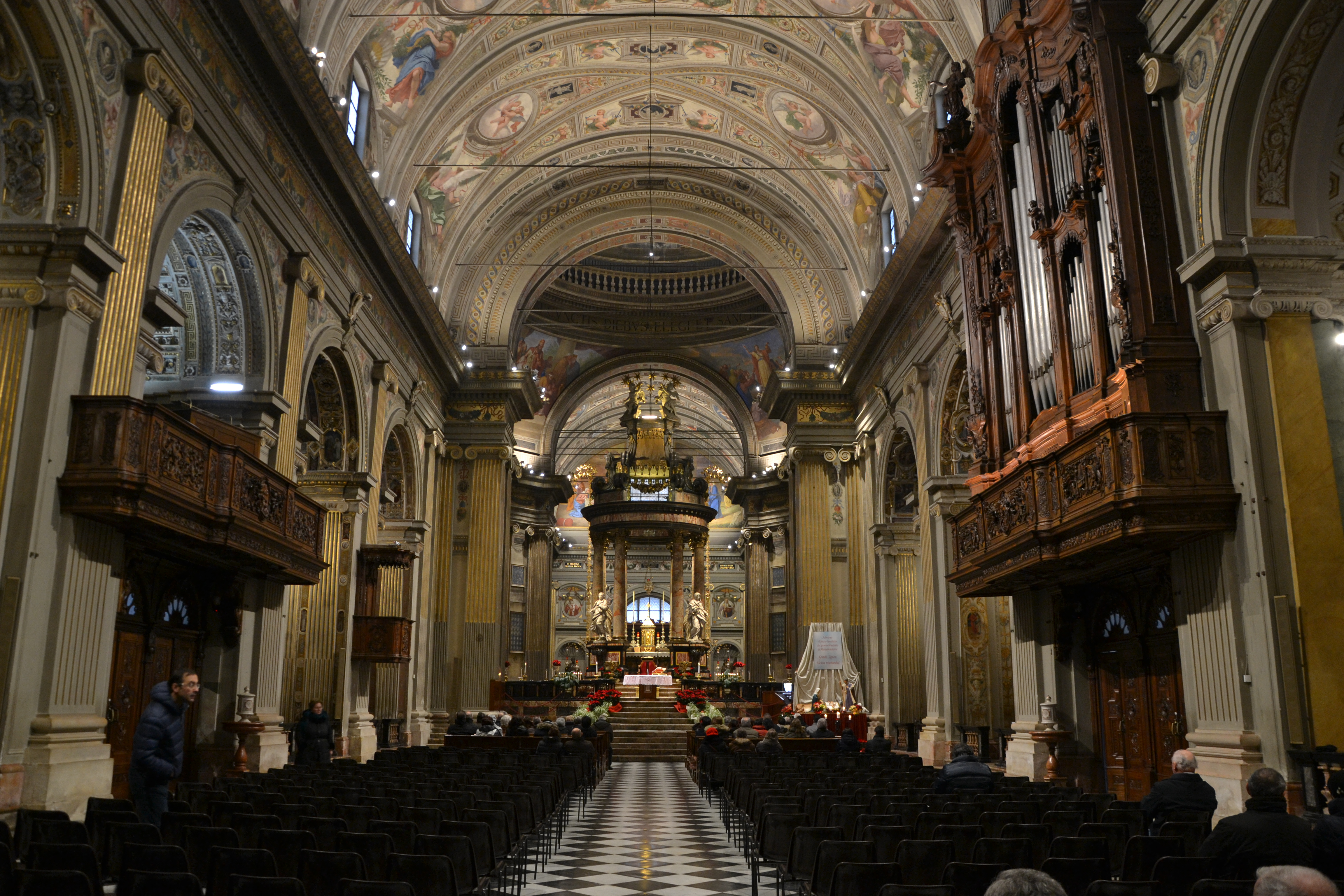 Sanctuary of Caravaggio